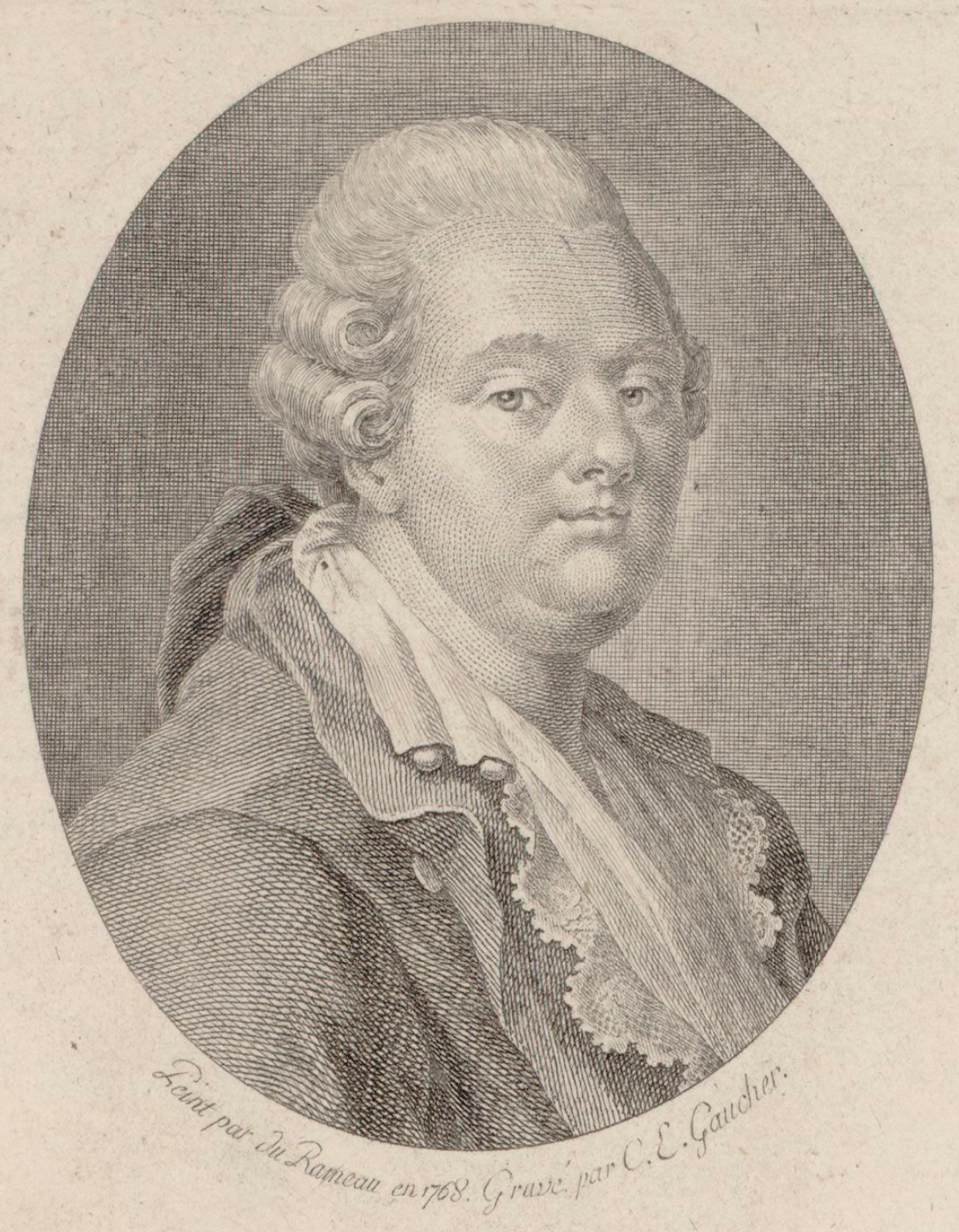 Portrait de Jean-Benjamin de La Borde.